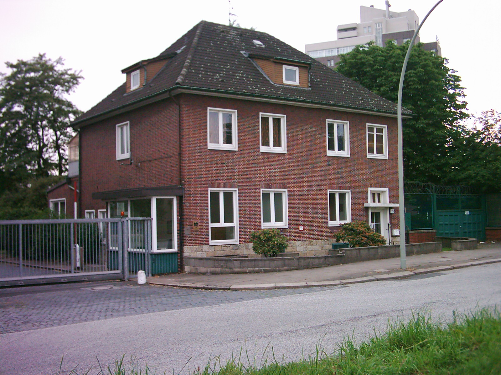 Die Zweigstelle der Bundesmonopolverwaltung für Branntwein (BfB) in Hamburg. (Schild)